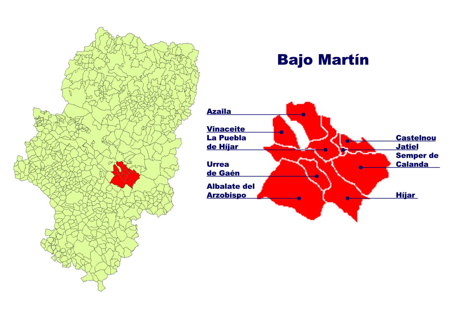 Comarca de Bajo Martín Creado el 02.11.2005 por Ecelan en base a Image:Aragon municipalities.png